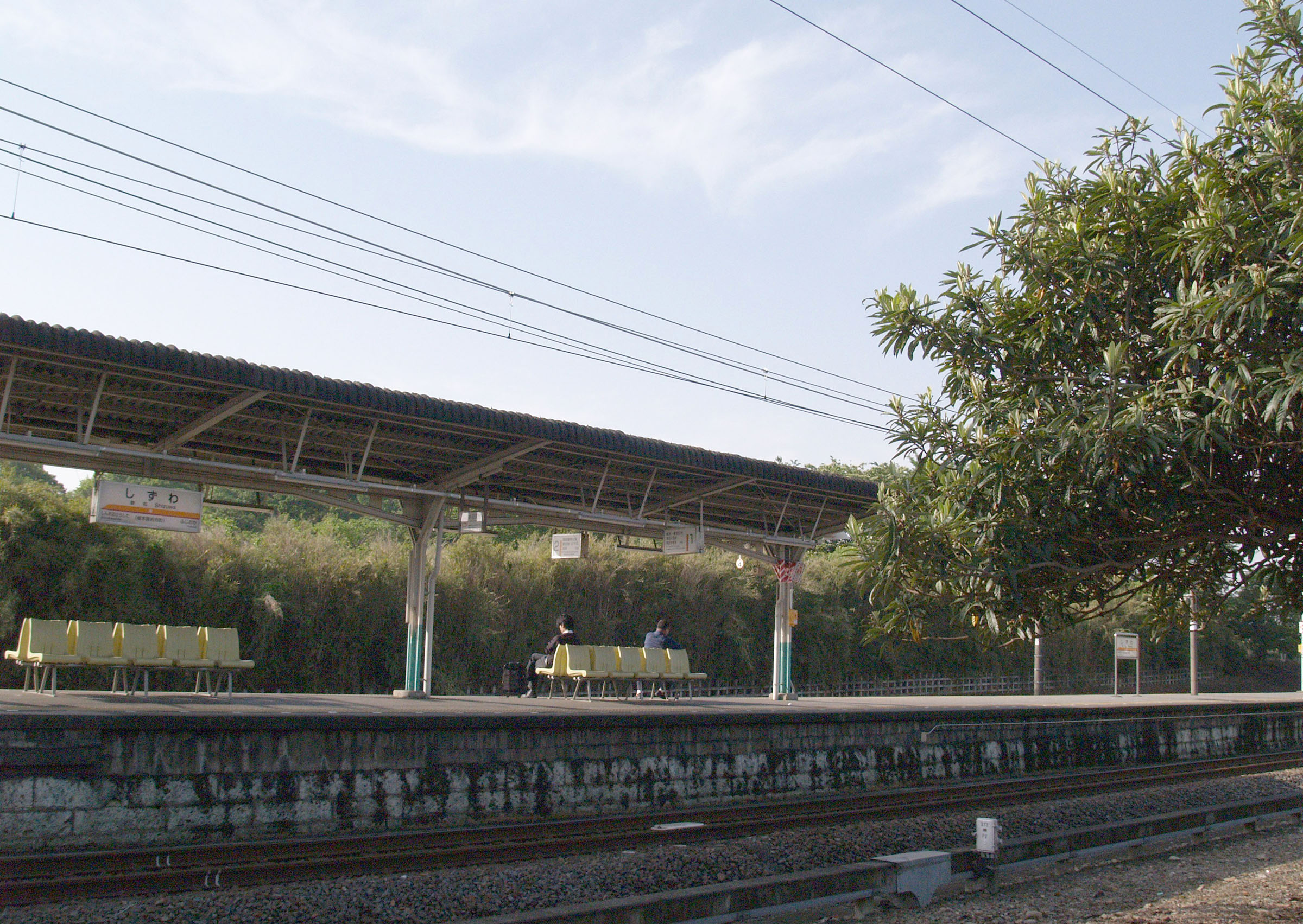 静和駅ホーム